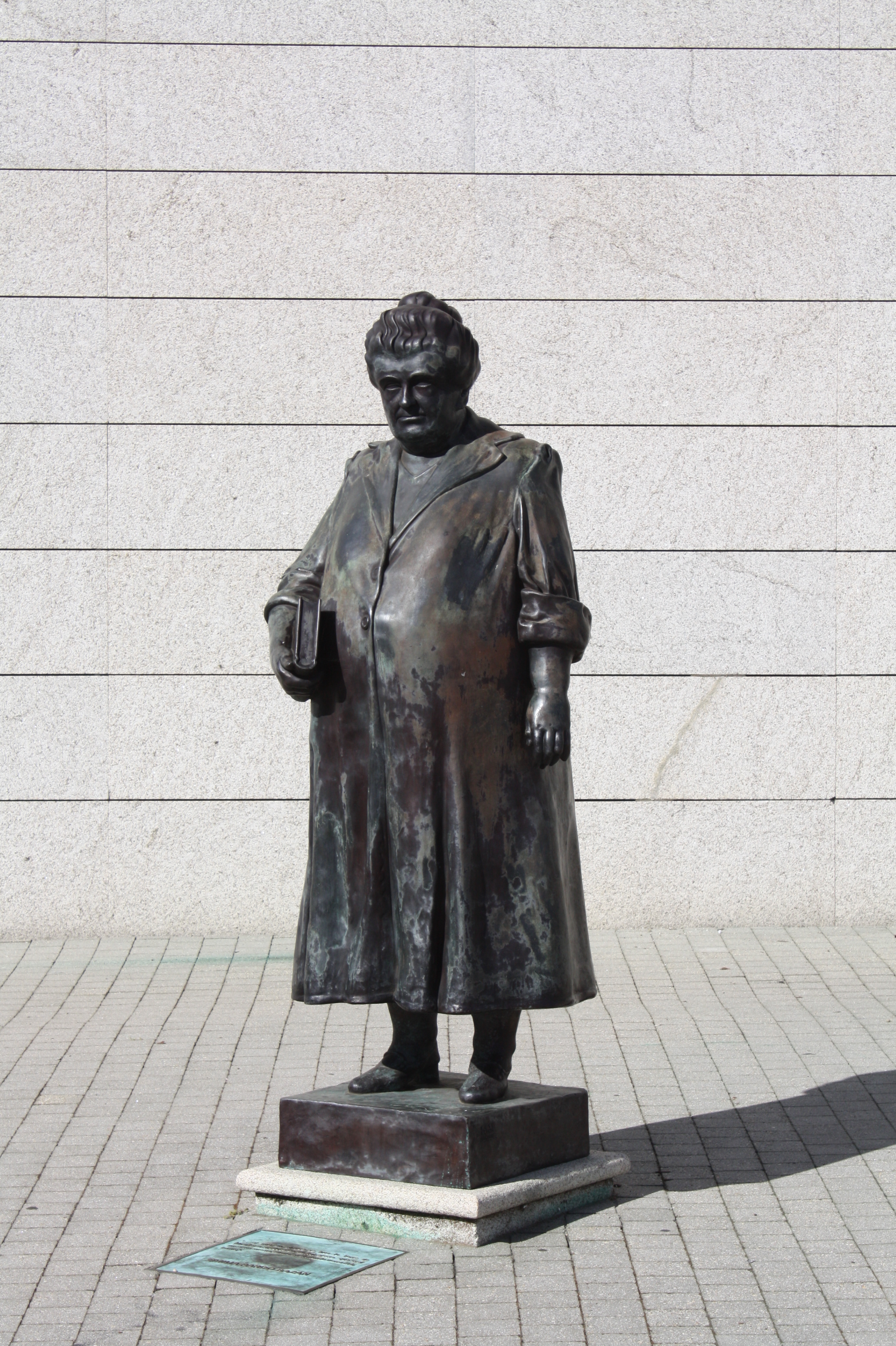 Escultura de Emilia Pardo Bazán, fronte ó Pazo da Cultura de Sanxenxo, Pontevedra